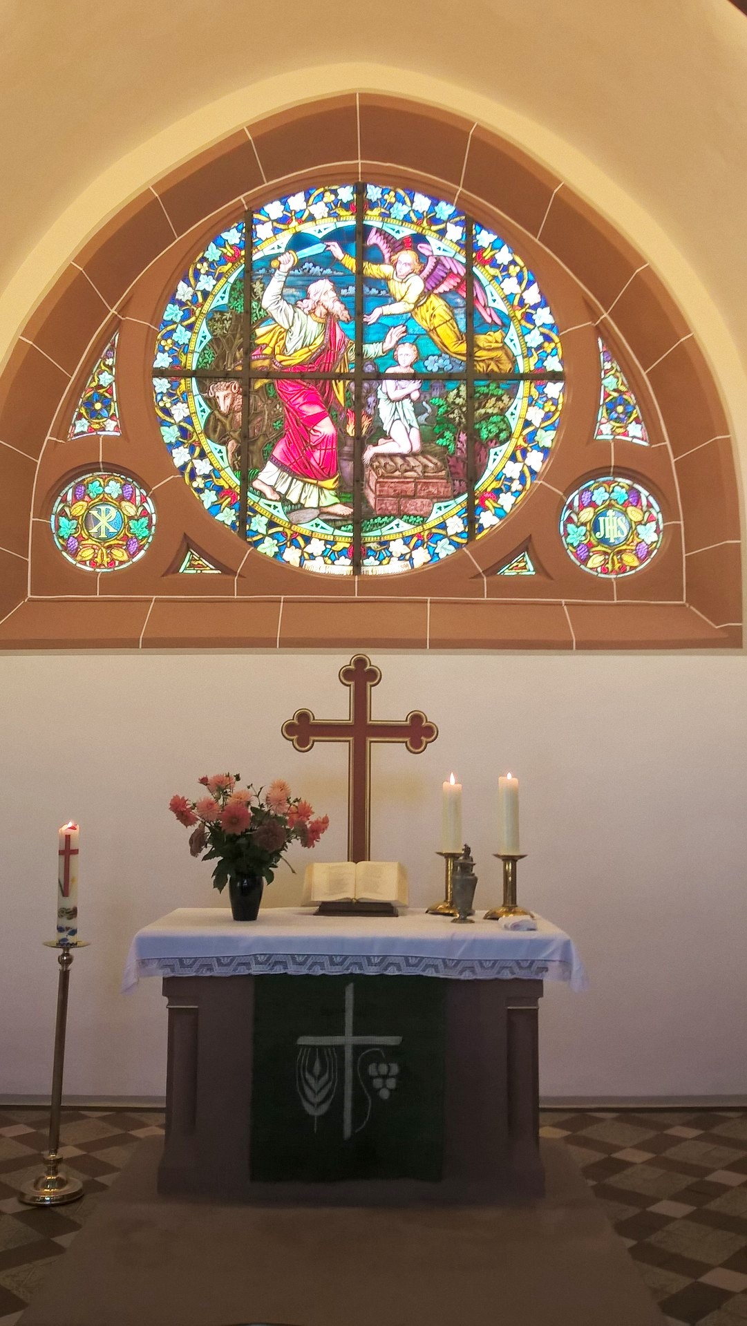 Evangelische Kirche Fellingshausen, Biebertal, Landkreis Gießen, Hessen, Deutschland